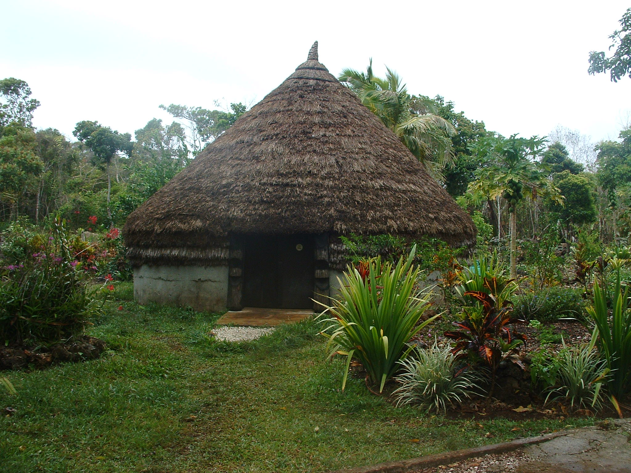 Case kanak traditionnelle Lifou Nouvelle-Calédonie photo personnelle libre de droits - free license picture